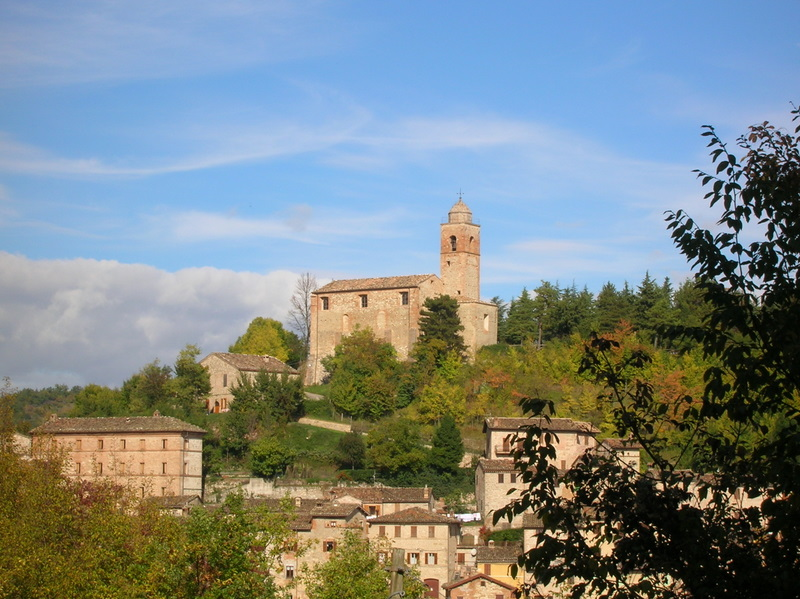 Chiesa di S.Francesco o Santa Maria del Girone a Montefortino, comunemente detta "chiesa dei frati"